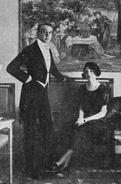 Primitivo Sanjurjo e Raquel Salgado, fotografía en Vida Gallega 1921